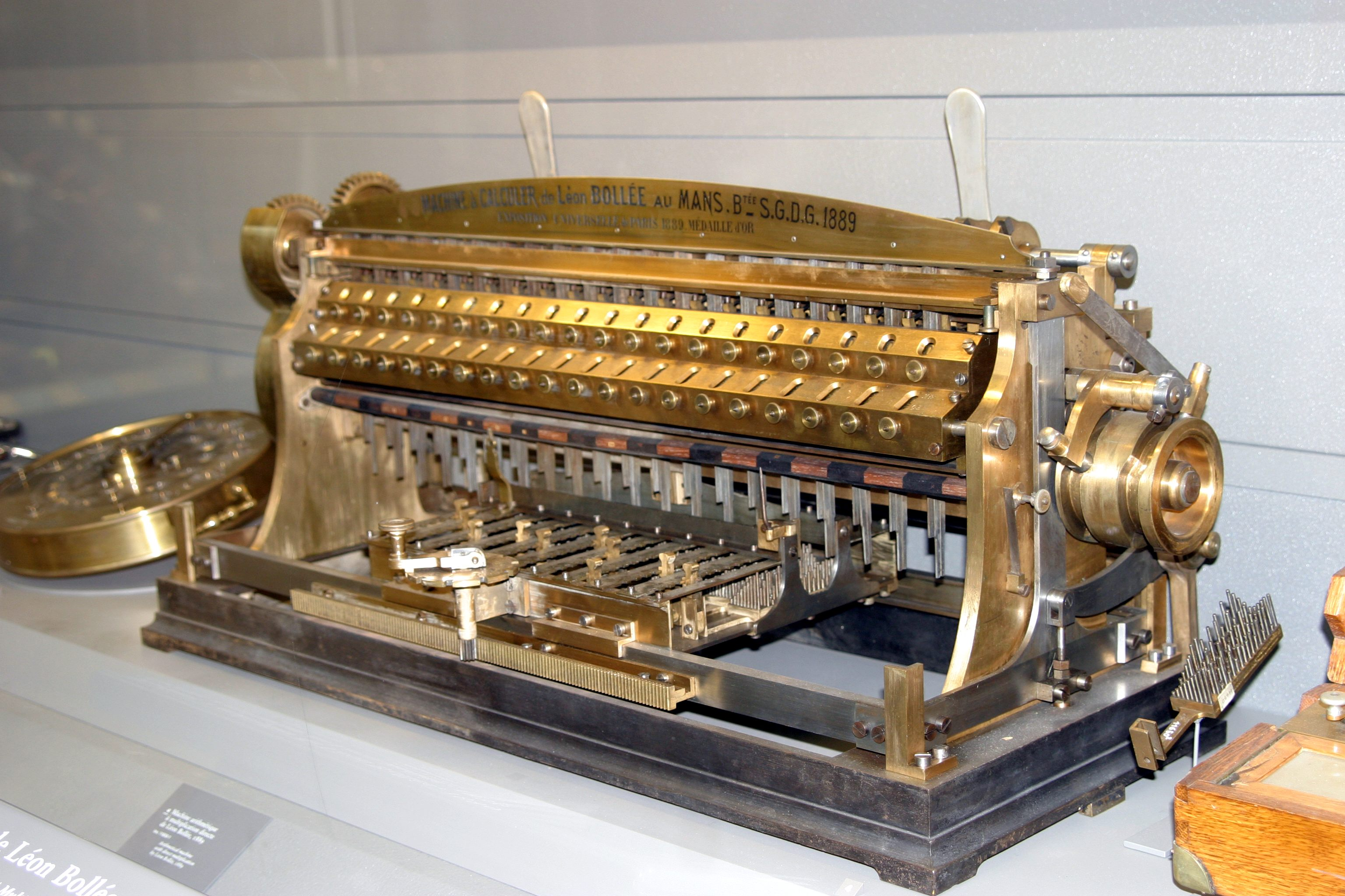 Calculatrice conçu par Léon Bollée, qui a la particularité de calculer les mulitplications. Cette calculatrice se trouve au musée des Arts et Métiers (Paris).